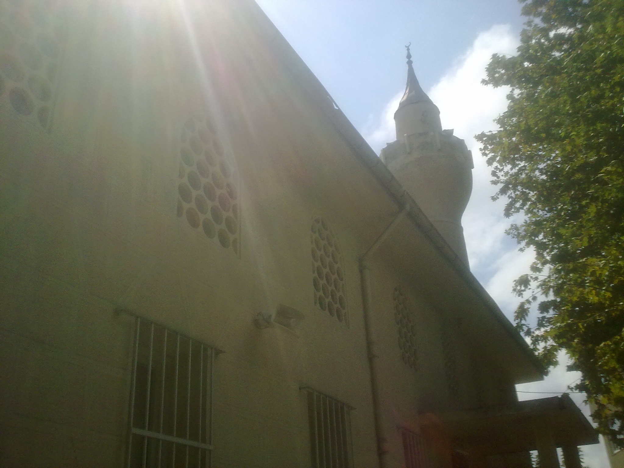 İmrahor Camii (Üsküdar)